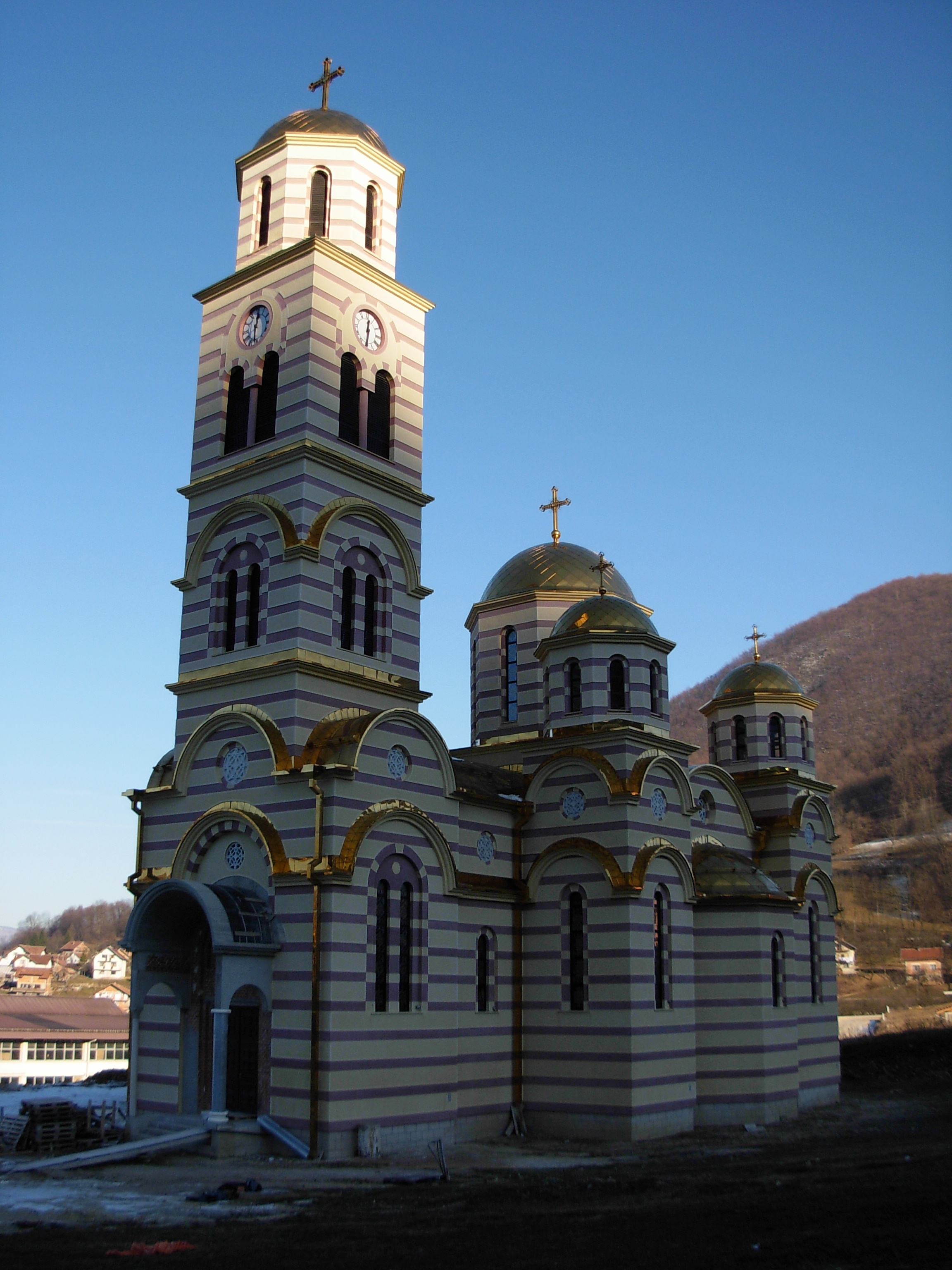 Hram Svetog Save u Mrkonjić Gradu.